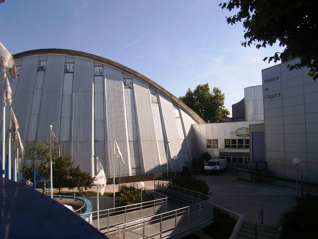 Théâtre national de l'Agora d'Évry (Essonne)